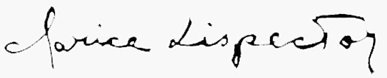 Unterschrift der brasilianischen Schriftstellerin Clarice Lispector Português do Brasil: Assinatura do escritora brasileira Clarice Lispector